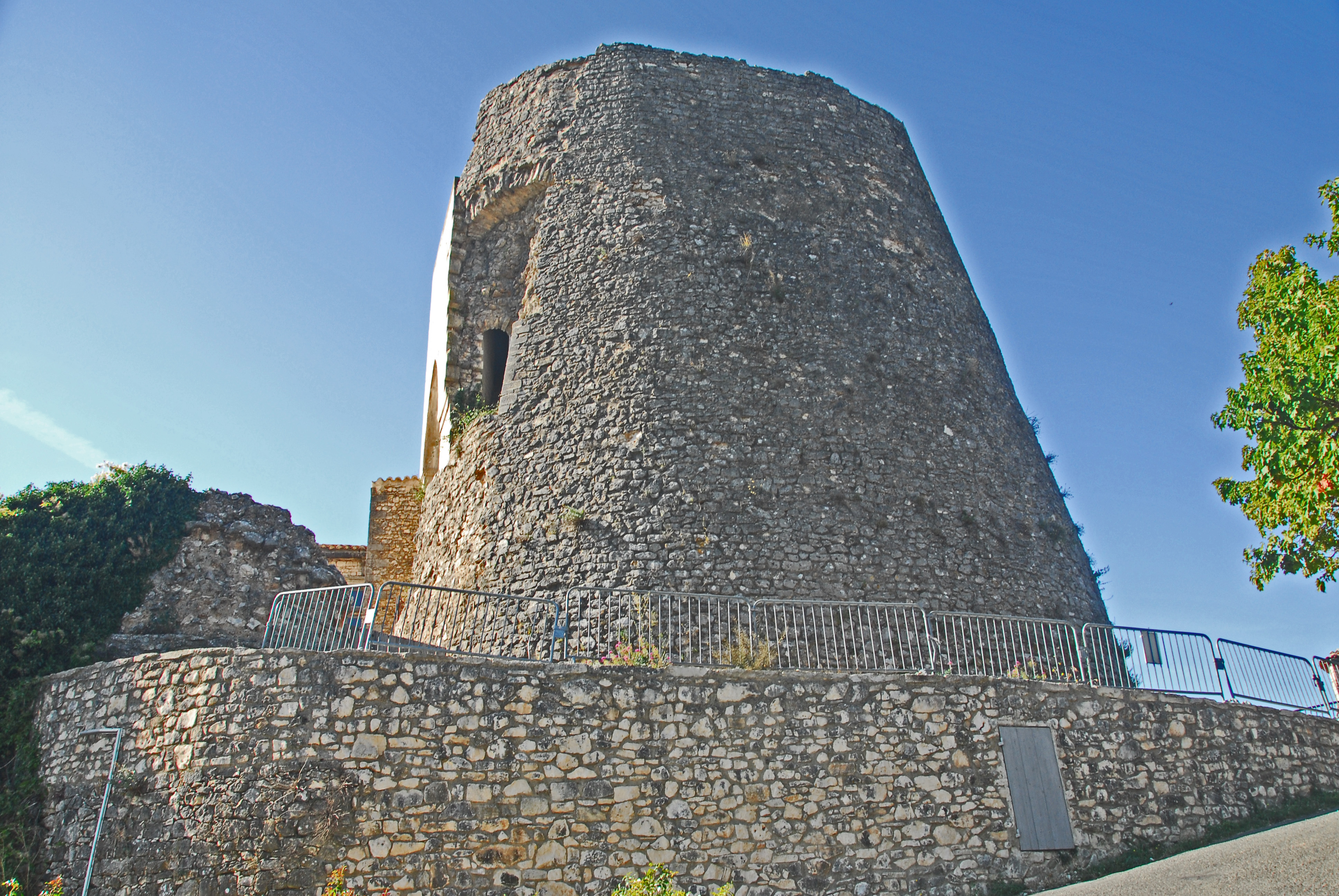 Chateau de Simiane-la-Rotonde, Donjon von N